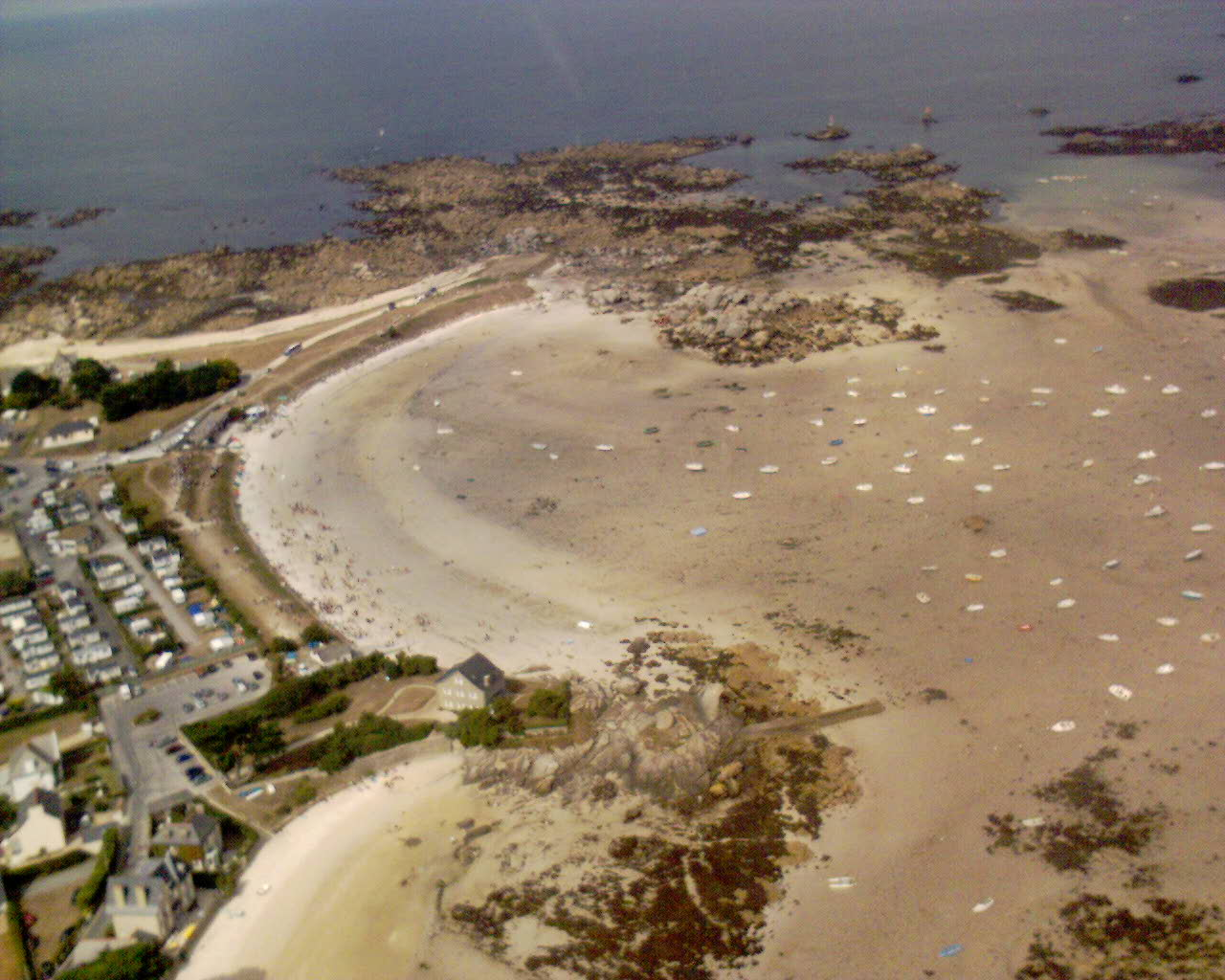 Brignogan-Plages : Anse de Pontusval à marée basse, vue d'hélicoptère. Auteur : Bertrand SIMON